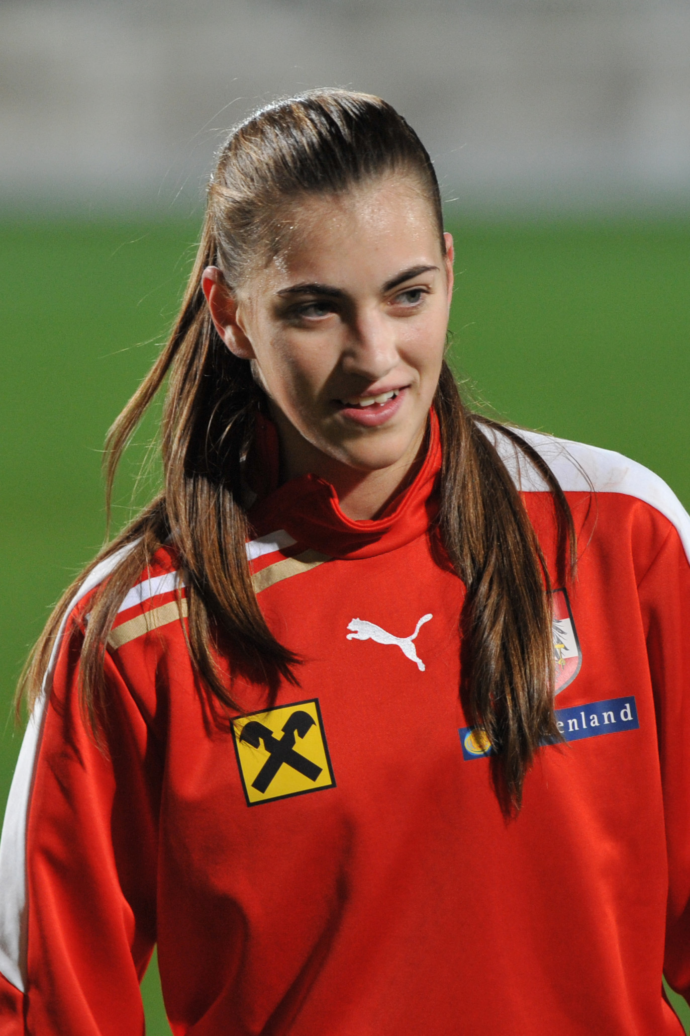 FIFA Women's World Cup 2015 Qualiying Round Österreich - Frankreich am 31. Oktober 2013 in Ritzing: Jelena Prvulovic